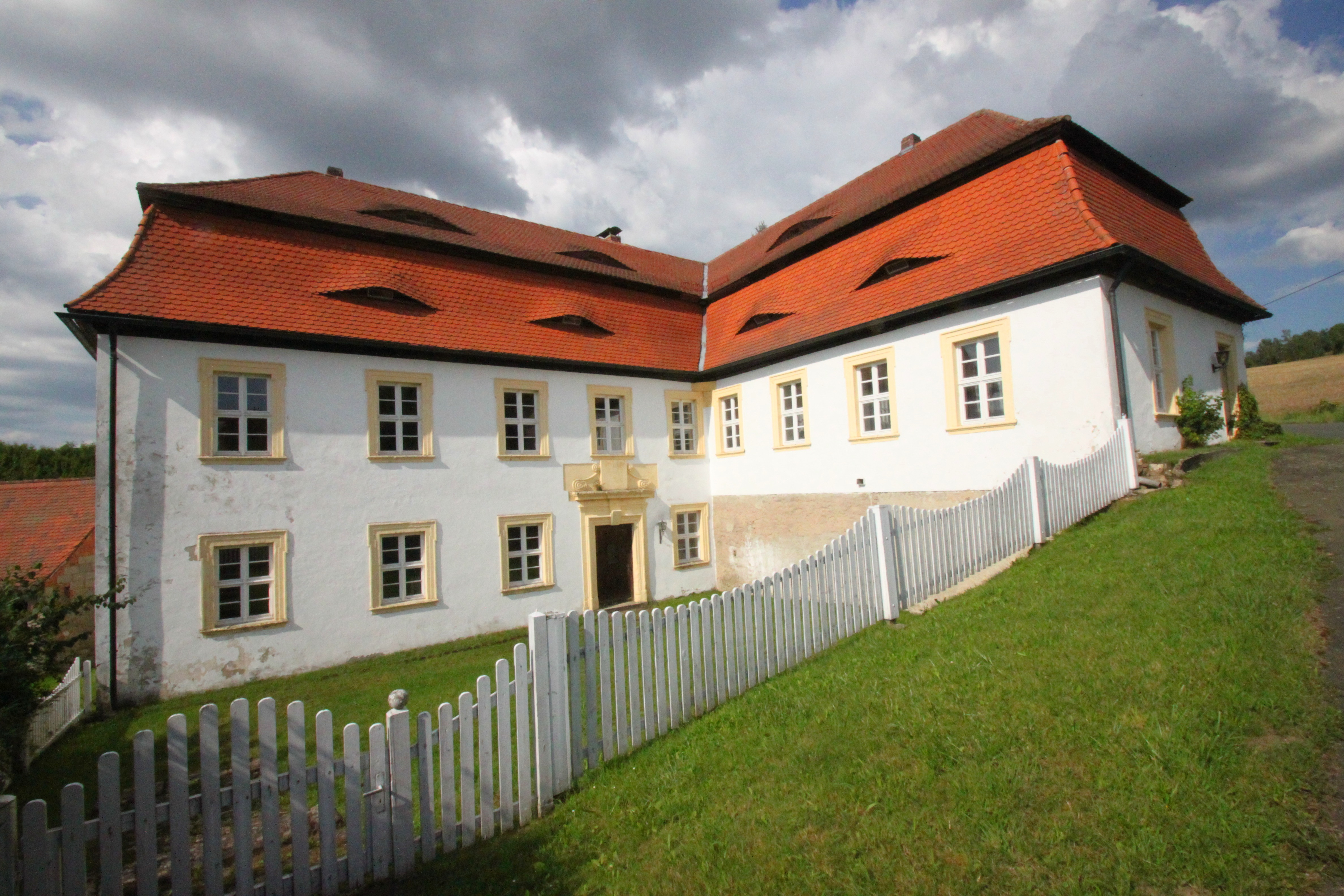 Herrenhaus des ehemaligen Rittergutes, Breitenreuth 1, Guttenberg (Oberfranken), Baudenkmal D-4-77-118-16